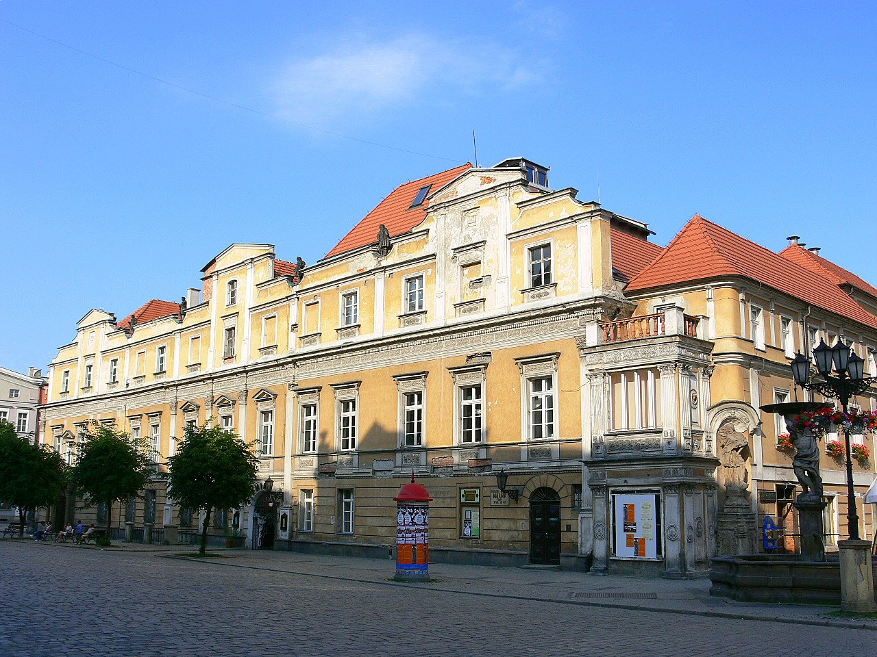 Swidnica - Ratusz miejski